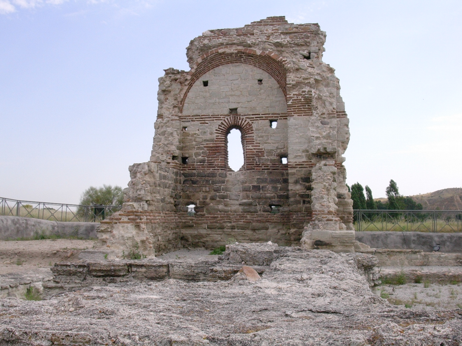 Archäologischer Park von Carranque, Basilika